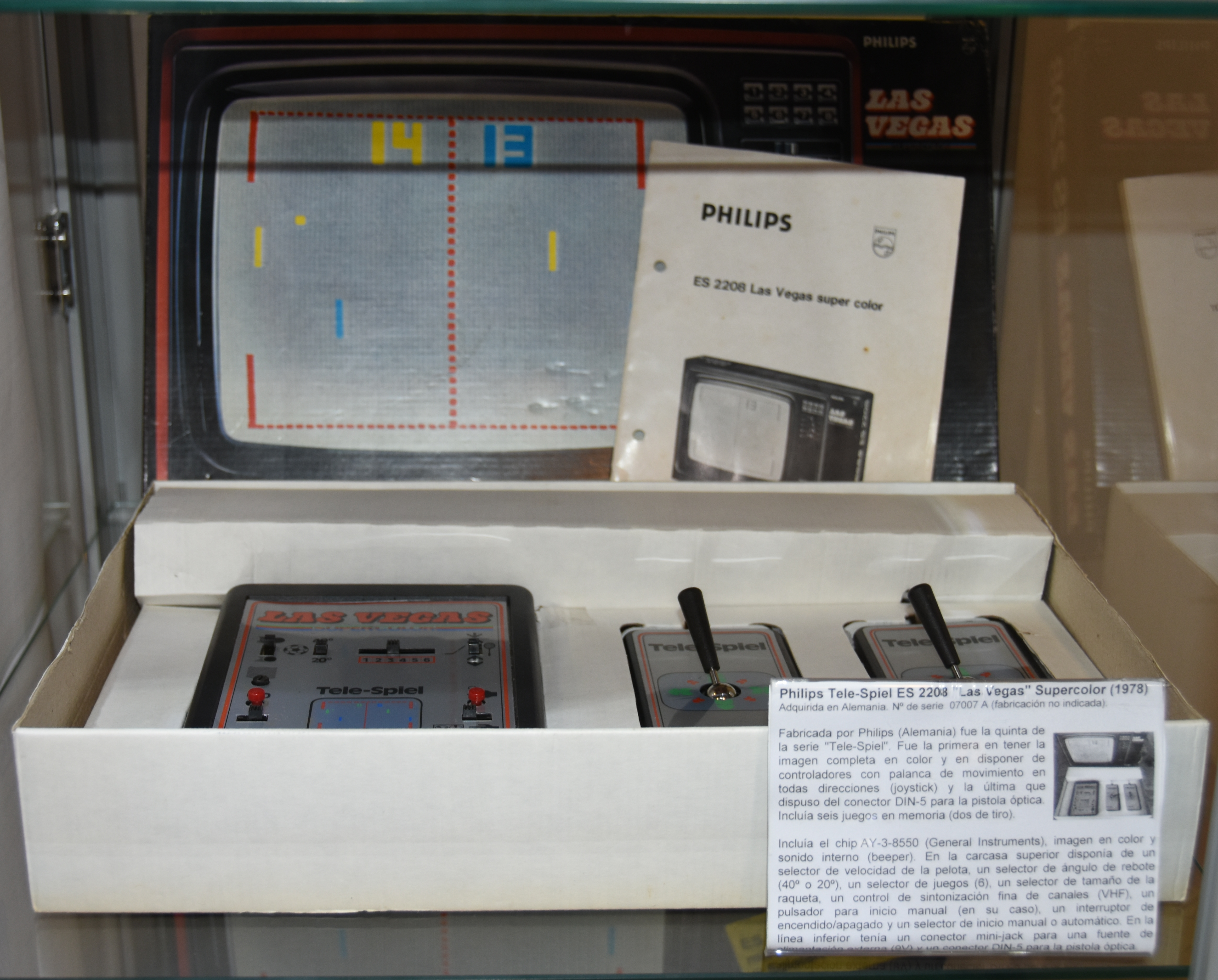 Philips Tele-Spiel ES-2208 Las Vegas Supercolor. Pong console, 1978 [Fotos por cortesía de Fernando Sáenz]